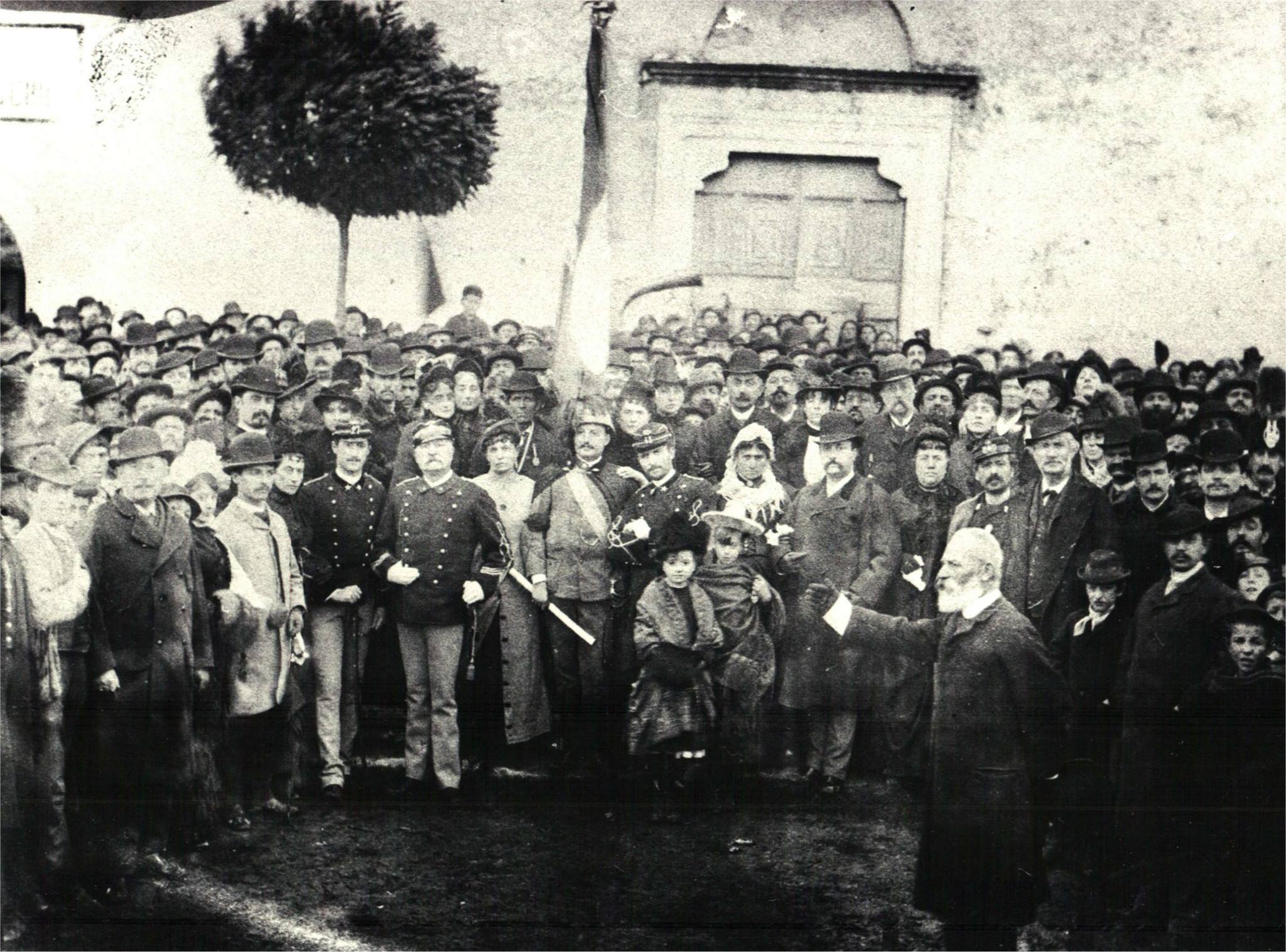 Consegna Onoreficienza al Maggiore Luigi De Amicis in partenza per la guerra D'Africa, qui in divisa coloniale, e morto ad Adua nel Marzo 1896. Foto risalente alla metà del 1895, davanti il Convento della Maddalena a Castel di Sangro (Italia, AQ). Presente l'allora sindaco Clemente Marchionna.